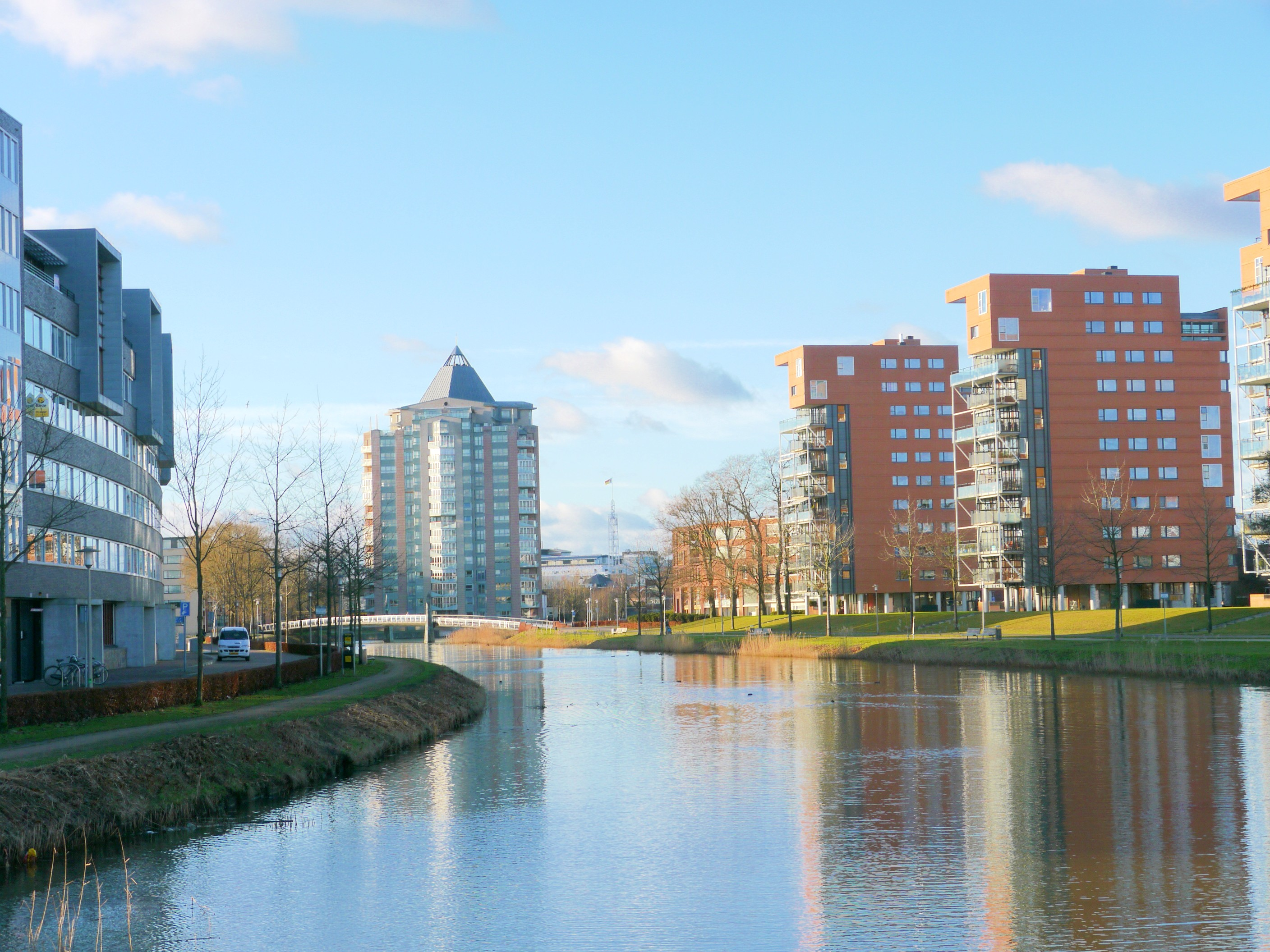 Grootschalig verbouwde kanaaloevers in Apeldoorn. Foto genomen vanaf de 'Welgelegenbrug'. In het midden de torenflat 'Het Potlood'. Juist daarvoor de brug 'De Freule'. Op de achtergrond, rechts van Het Potlood is het torentje van het stadhuis te zien.